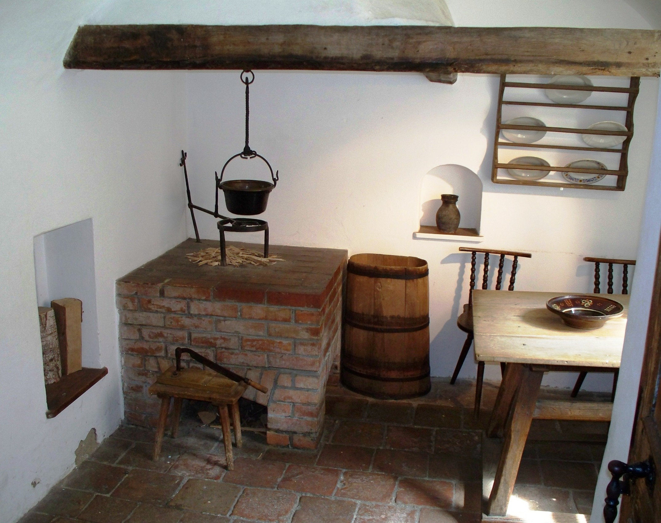 Die Küche des Hauses Nr. 13 in der Fuggerei, Augsburg.